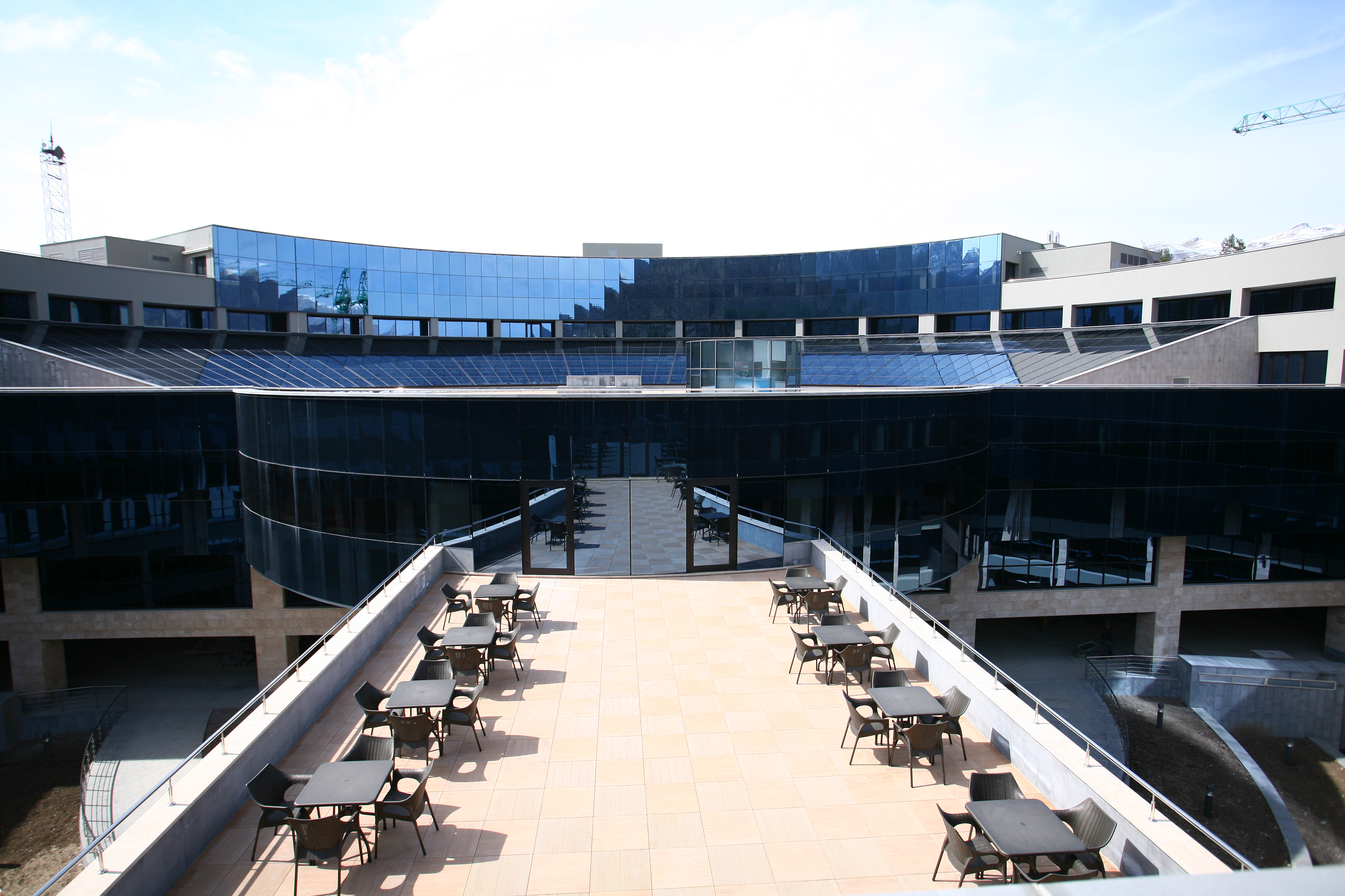 Դիլիջան Ուսումնահետազոտական Կենտրոն_2